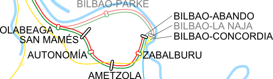 Aldirikoak Renfe Bilboko Trenbide Hego Ingurabidearen mapa / mapa de la Variante Sur Ferroviaria de Cercanías Renfe Bilbao